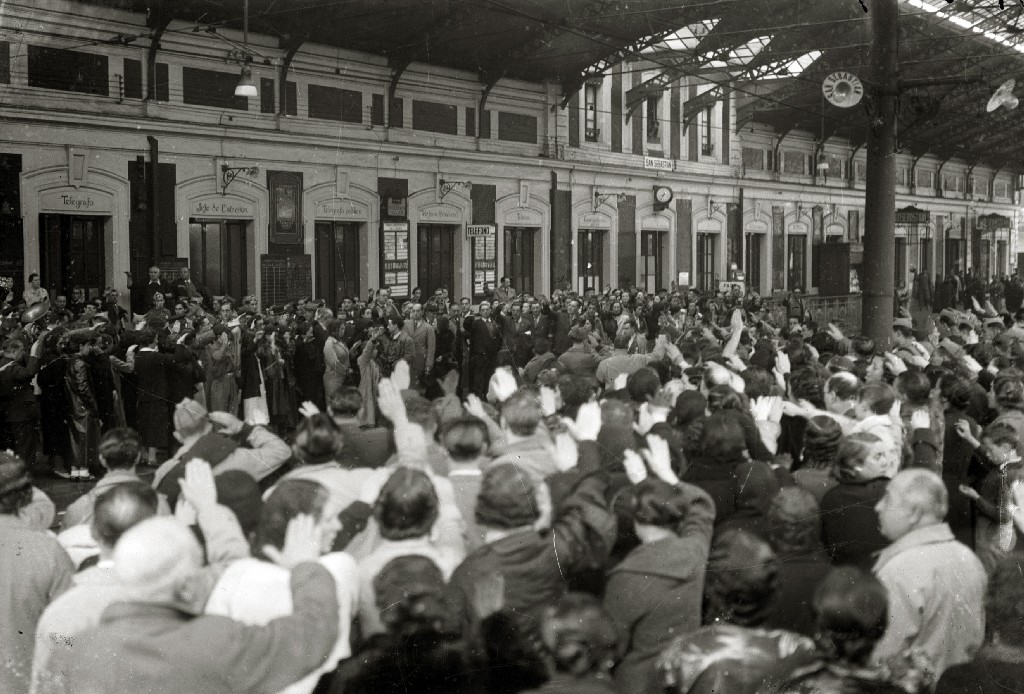 Título original: Llegada de tropas del Frente Nacional a la estación del Norte (1/1) Localización: San Sebastián (Guipúzcoa)